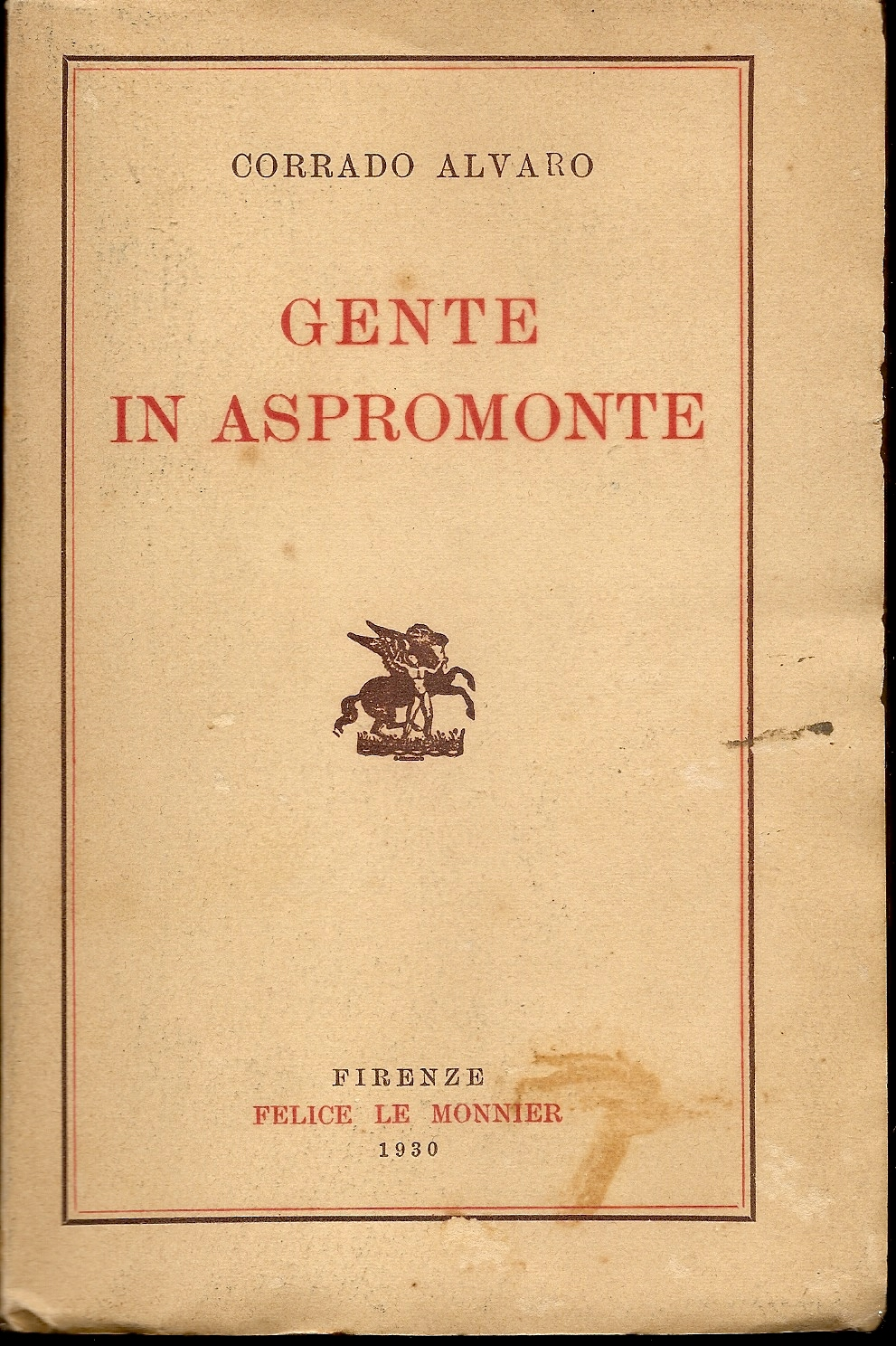 Copertina prima edizione di "Gente in Aspromonte" di Corrado Alvaro, Firenze, Le Monnier, 1930